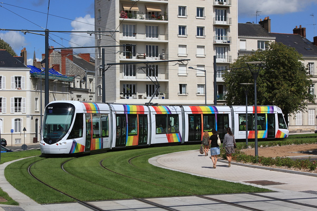 Une rame Citadis angevine s'apprête à desservir l'arrêt "les gares"